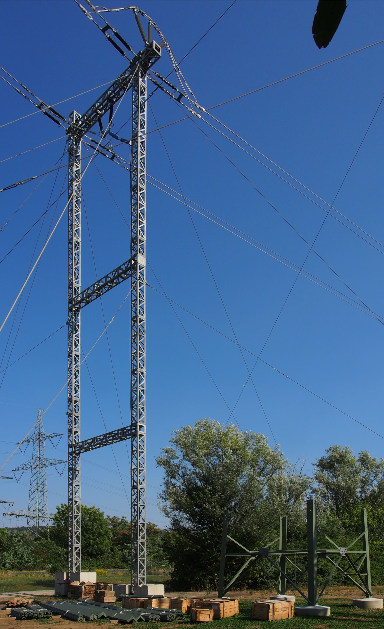 Temporärer abgespannter Hochspannungsmast, daneben ein angefangener neuer Gittermast und Bauteile